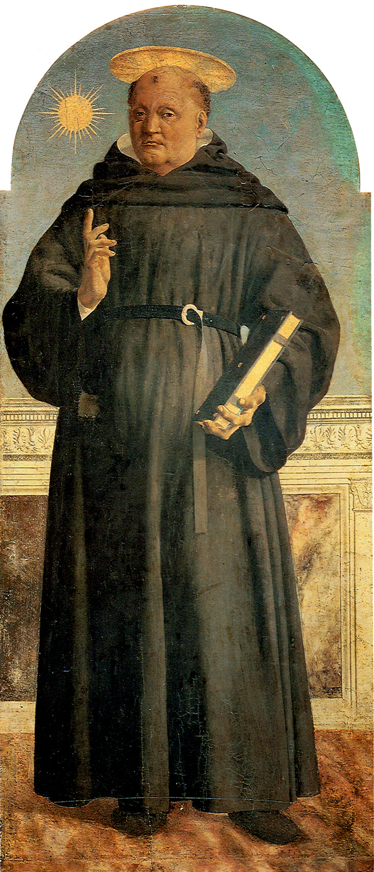 Saint Nicolas of Tolentino Piero della Francesca Oil and tempera on panel, 139,4 x 59,2 cm Milan, Museo Poldi Pezzoli